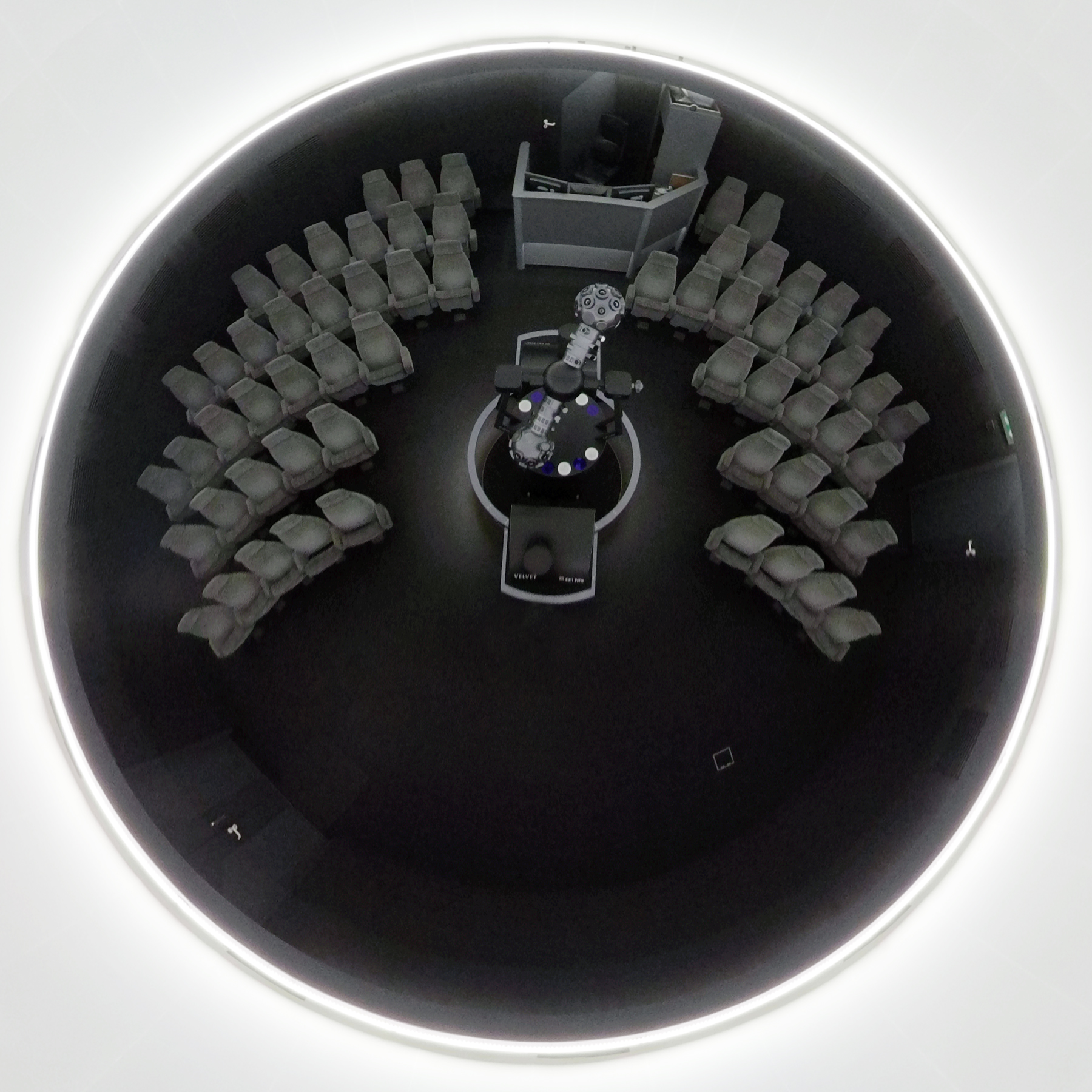 Kuppelsaal des Laupheimer Planetariums mit unidirektionaler Sitzanordnung. In der Mitte befindet sich das Projektionssystem, bestehend aus einem Sternprojektor und einer Fulldome-Video-Anlage.